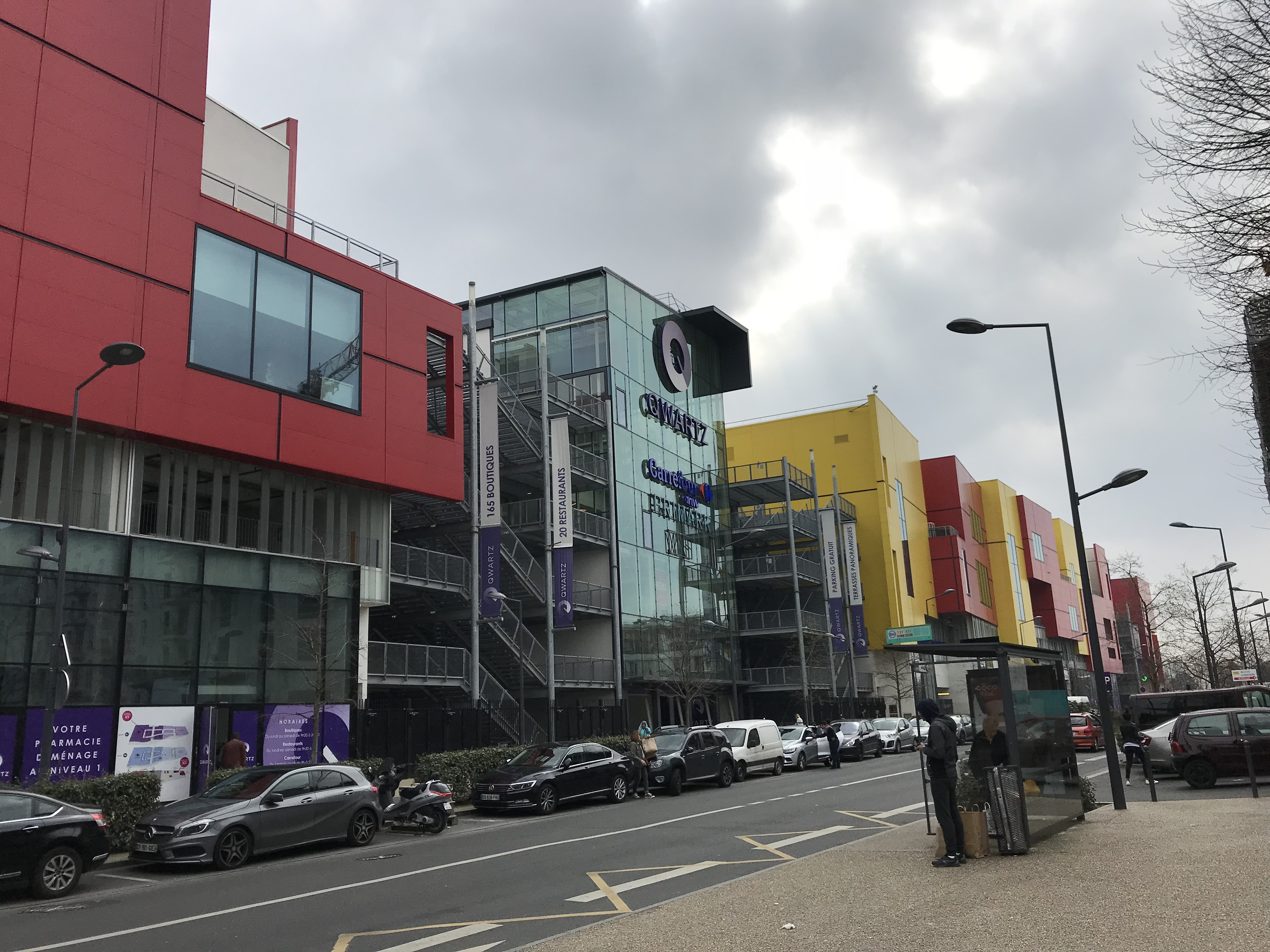 Centre commercial de Qwartz à Villeneuve-la-Garenne